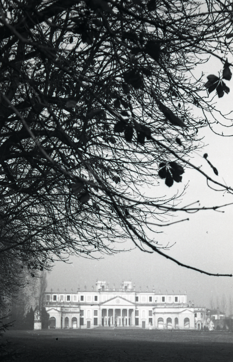 Serie fotografica : Italia, 1970 / Paolo Monti. - Strisce: 3, Fotogrammi complessivi: 18 : Negativo b/n, gelatina bromuro d'argento/ pellicola ; 35 mm. - ((Sul portanegativi: [NIKMAT? Ferrania Pancro P.3]. - La serie è contenuta nel contenitore numerato 4111 al cui interno sono collocate altre quattro strisce di tipologia di pellicola differente. In questo caso si è considerata la diversa tipologia di supporto come discriminante di serie, tenuto conto anche del fatto che presumibilmente le diverse strisce di pellicola sono state ricollocate nel contenitore senza alcuna relazione tra loro al di là della localizzazione. - Le Ville riprodotte in alcuni fotogrammi potrebbero essere alcune Ville palladiane.